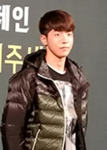 네파 따뜻한 세상 캠페인 론칭 발표회